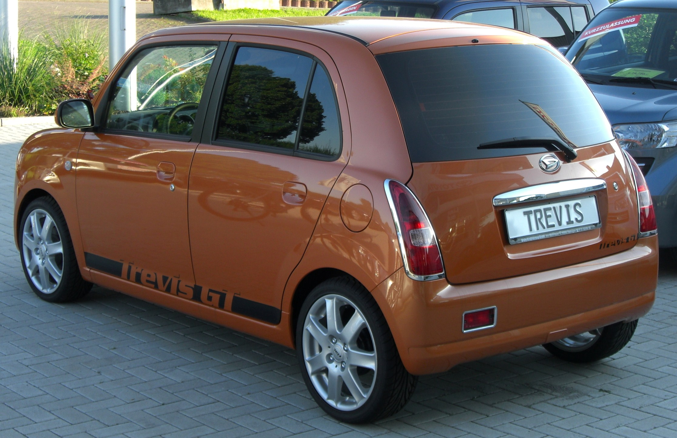 Daihatsu Trevis